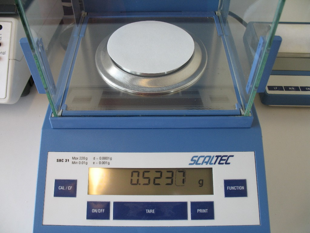 Waage mit leerem und getrocknetem Filter